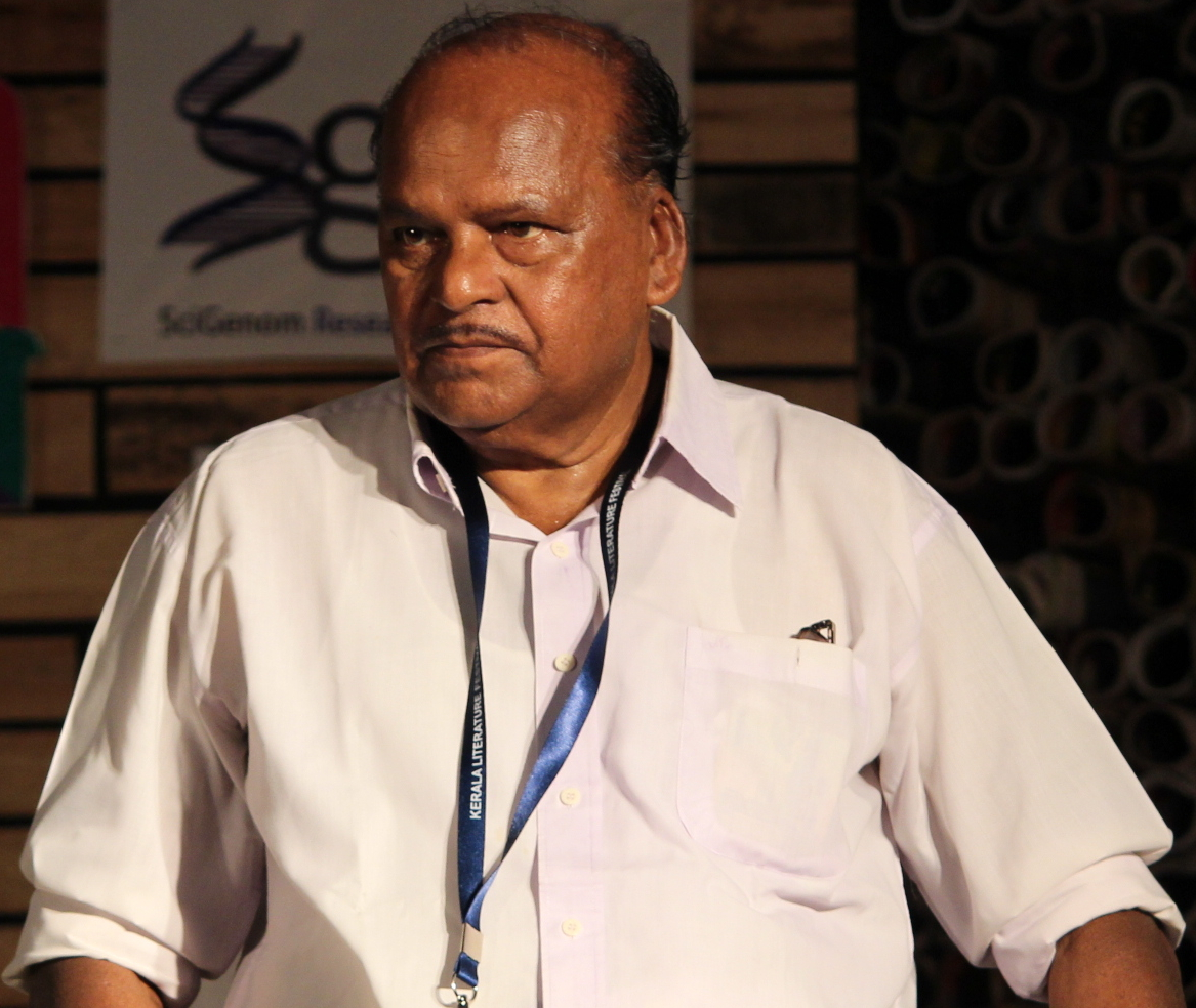 കോഴിക്കോടുവച്ചുനടന്ന ലിറ്ററേച്ചര്‍ ഫെസ്റ്റിവലില്‍ 2017 ഫെബ്രുവരി 3ന്